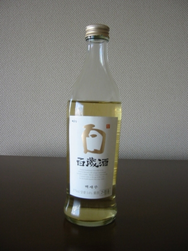 百歳酒(pekusezyu)：韓国の伝統酒